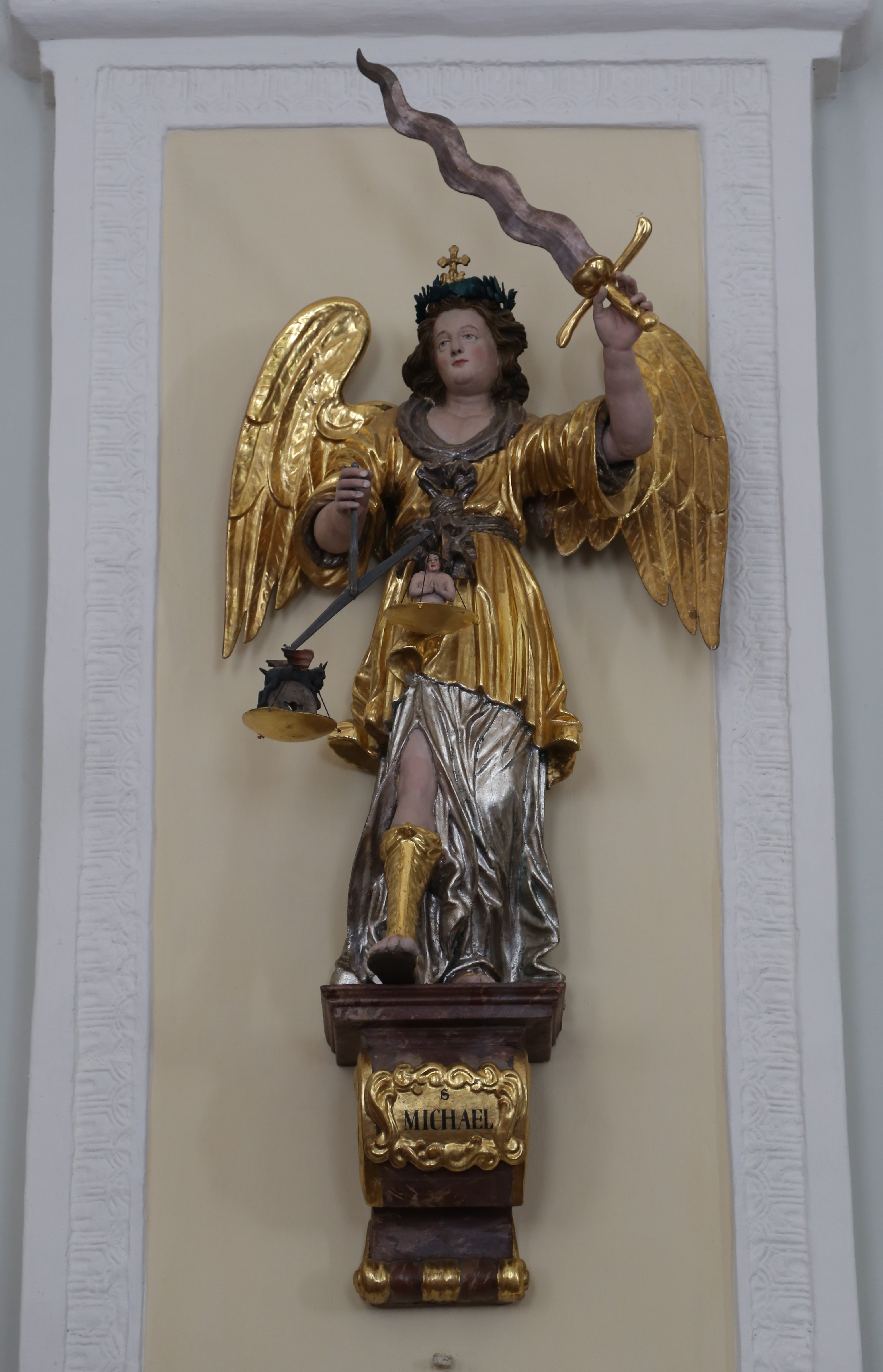 Sankt Georg, Brandenberg (Tirol)